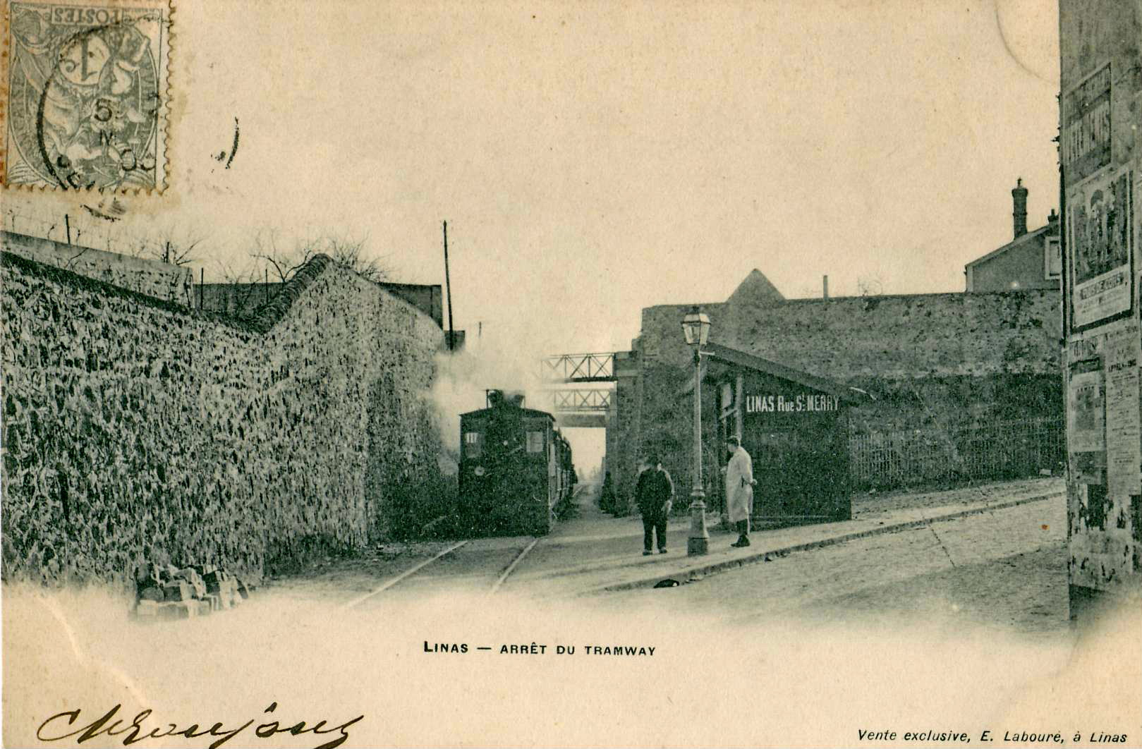 Carte postale ancienne éditée par LaboureLinas : Arrêt du tramway